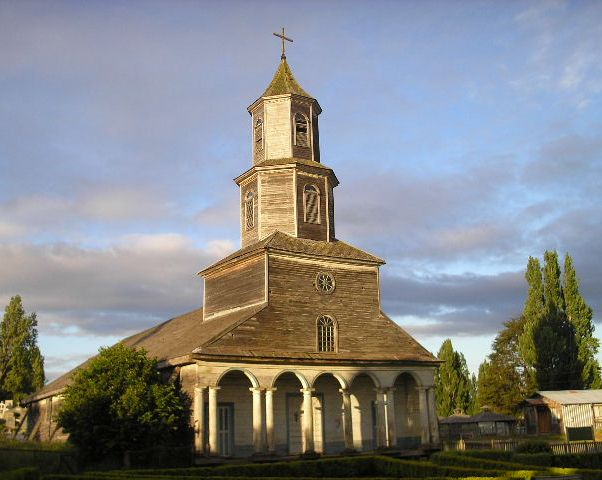 Fachada de la iglesia Nuestra Señora de Gracias de Nercón, Castro, Chiloé, Chile.